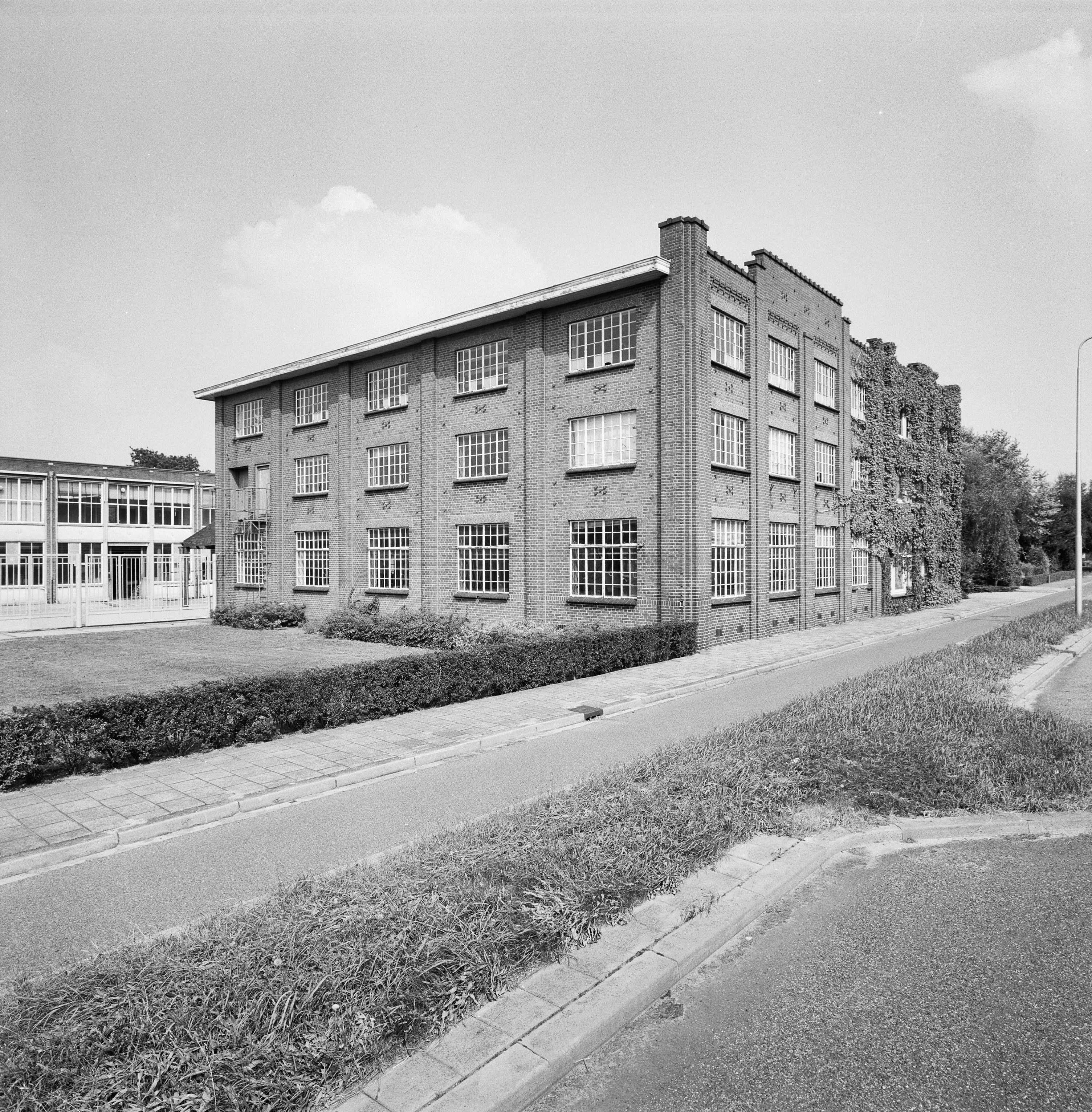 Union-fietsenfabriek: Overzicht voorgevel en linker zijgevel (opmerking: Gefotografeerd voor Monumenten In Nederland Overijssel, bladzijde 219)